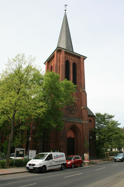 St. Germanus, Haaren, 3 km from Aachen, Deutschland (Zone 32).